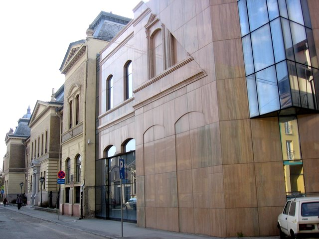 Зграда Матице српске у Новом Саду